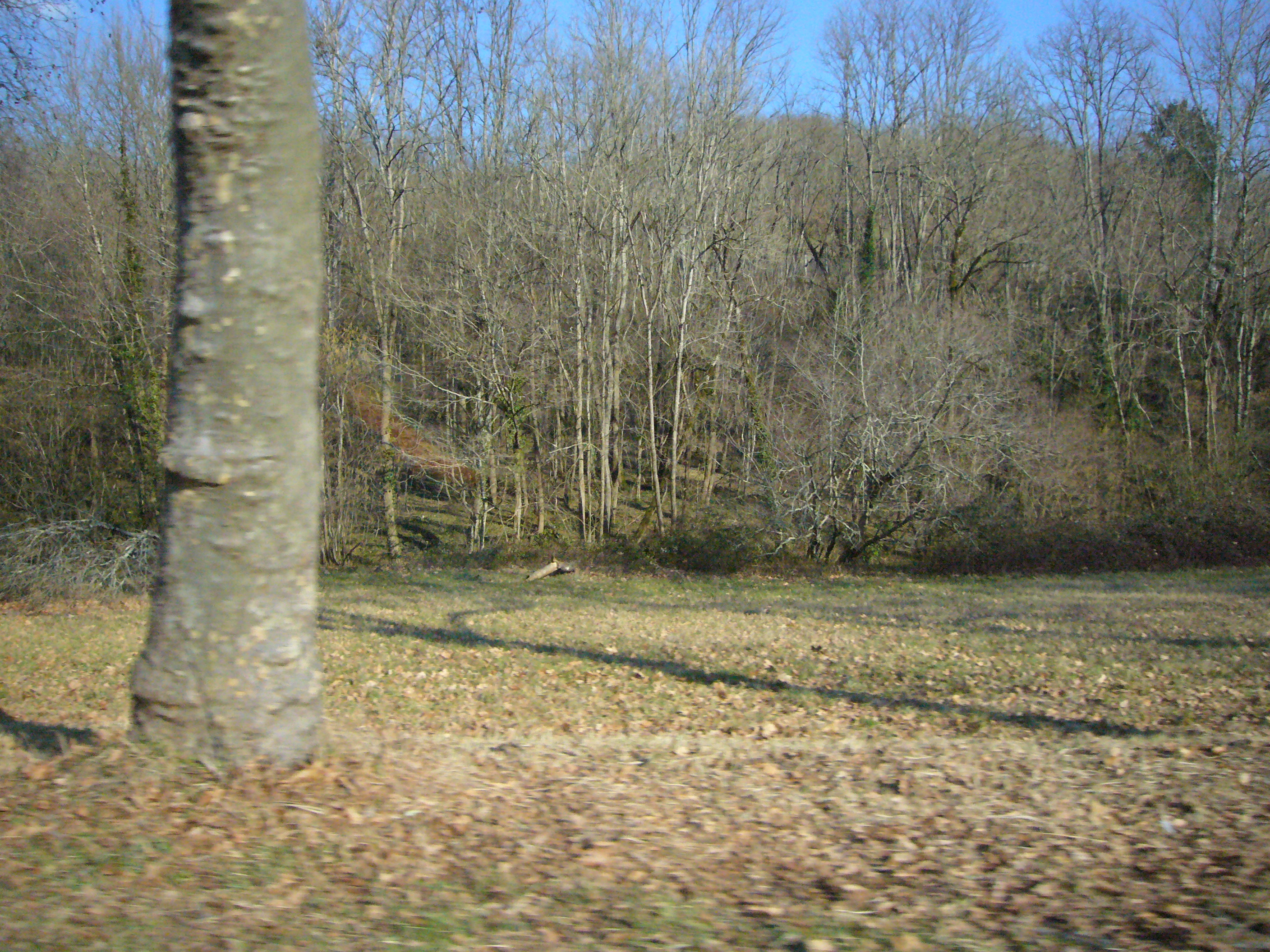 Paysage du "causse corrézien"